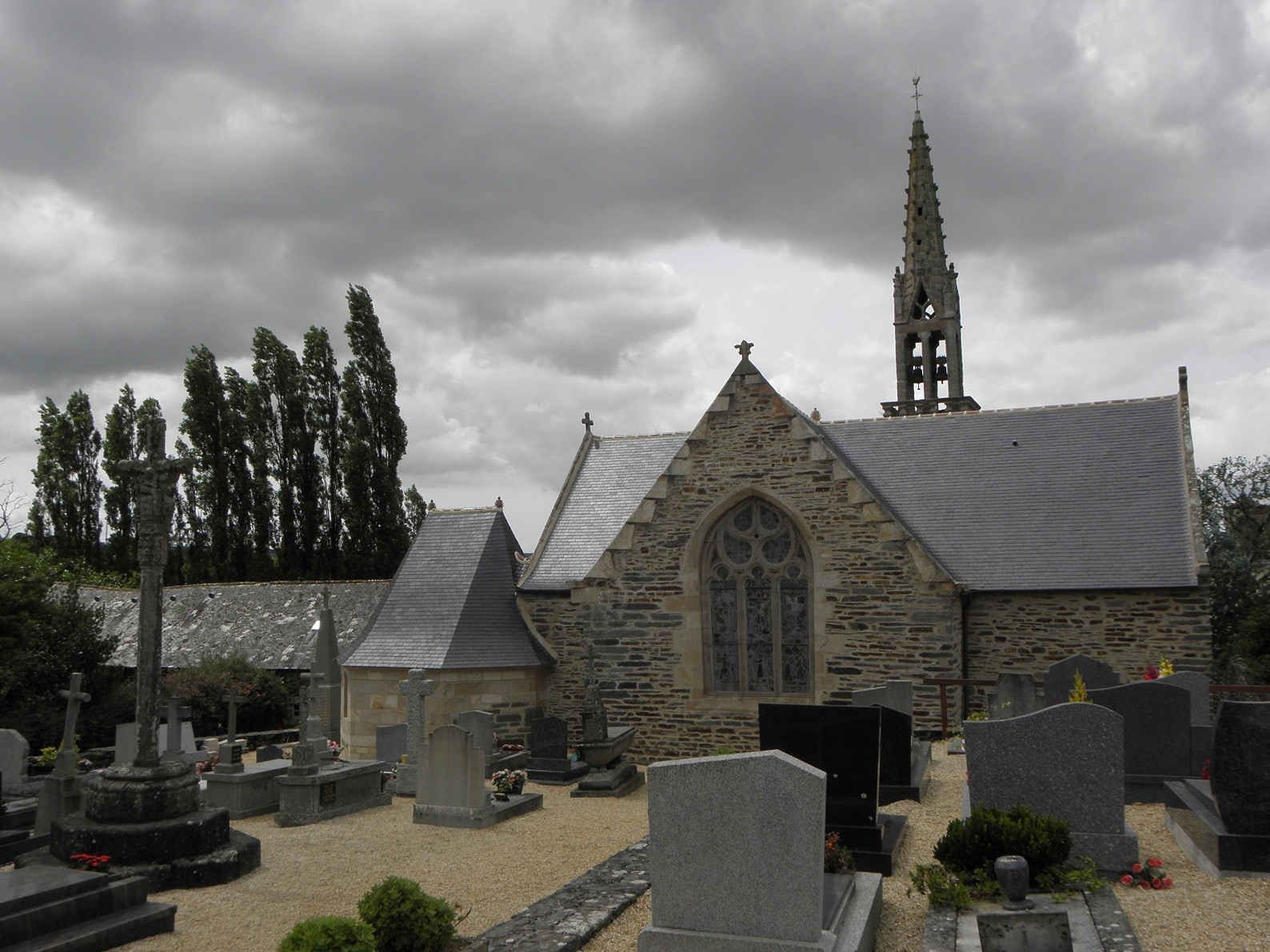 Chevet de l'église Saint-Coulitz (29) en la commune éponyme.